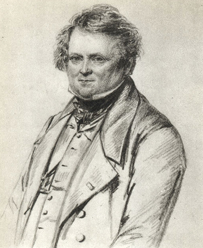 Bengt Magnus Bolmeer (1785-1849)